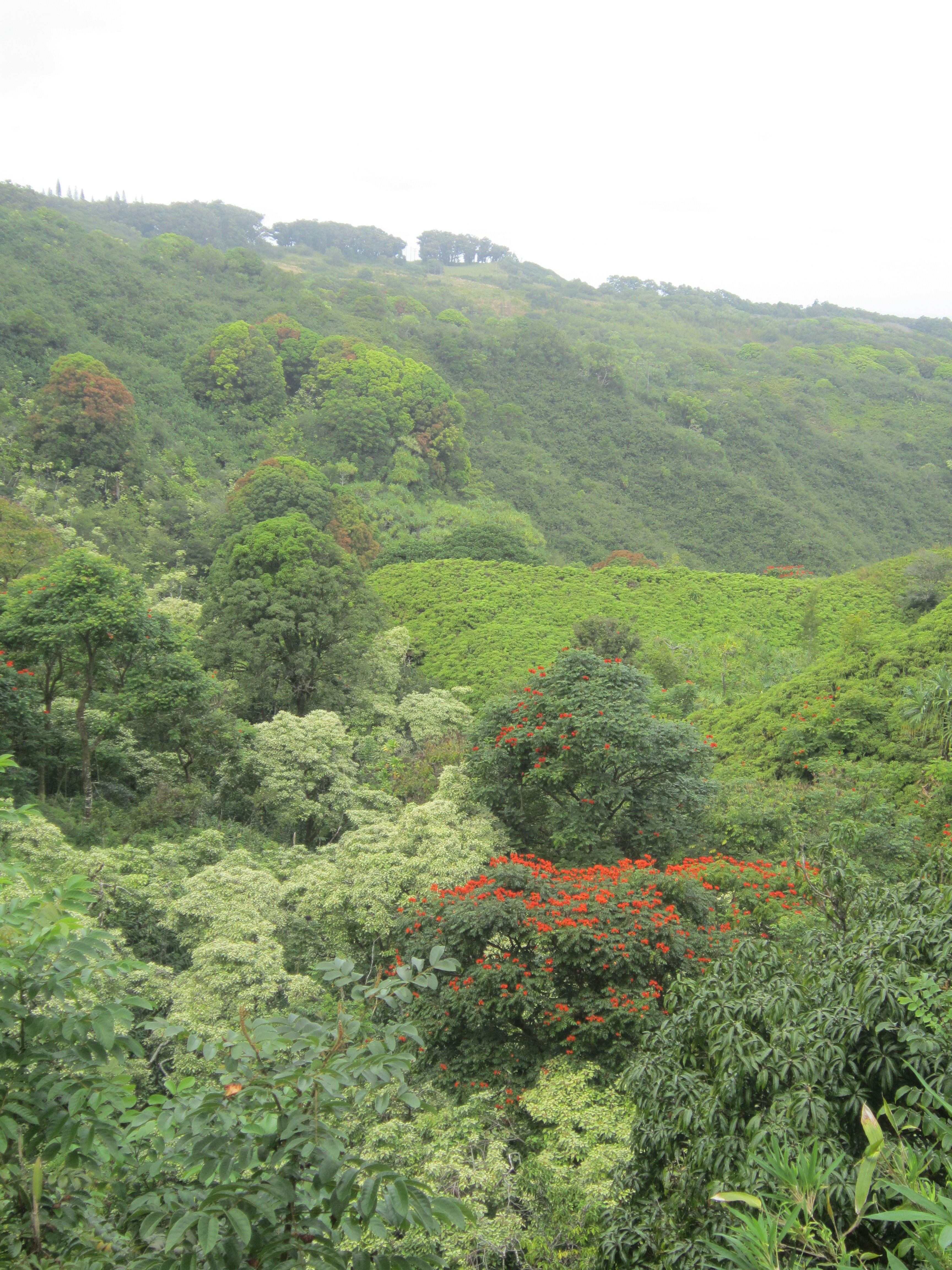 Hana Maui